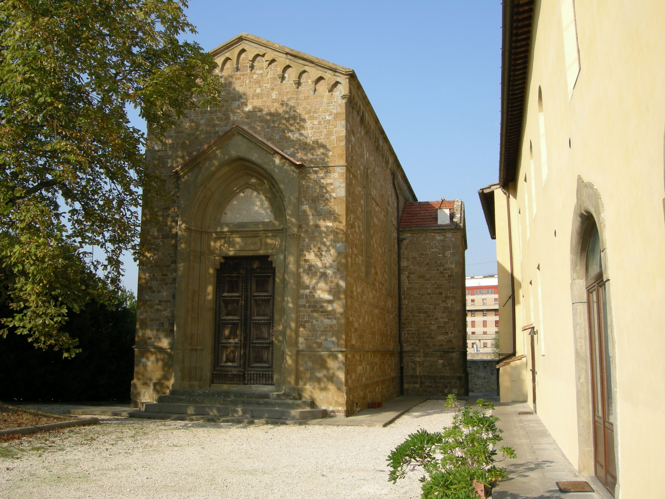 Castello di torregalli, cappella